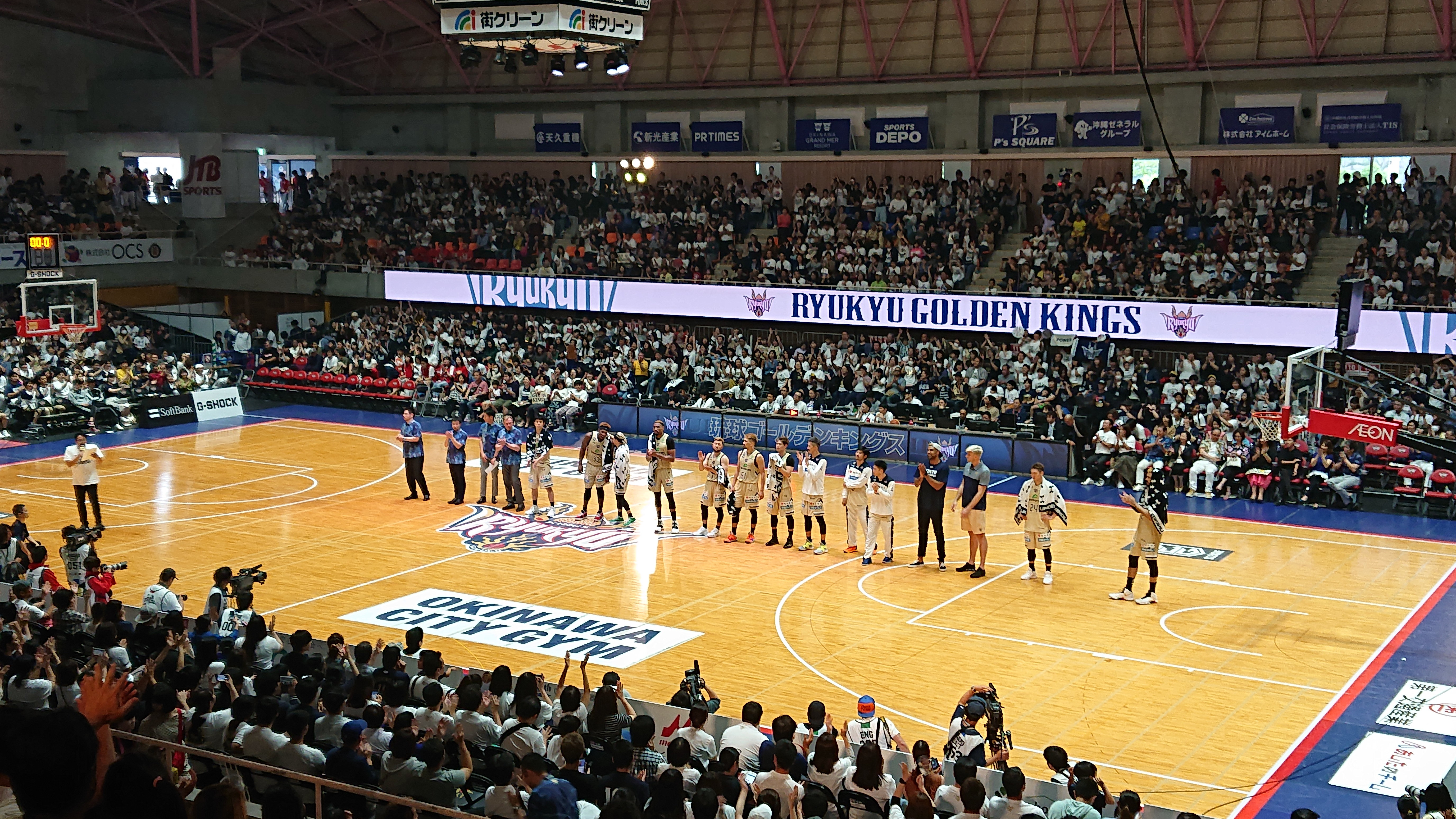 Bリーグチャンピオンシップ2018 - 2019 琉球ゴールデンキングスvs名古屋ダイヤモンドドルフィンズ 第二戦 試合終了後のあいさつ